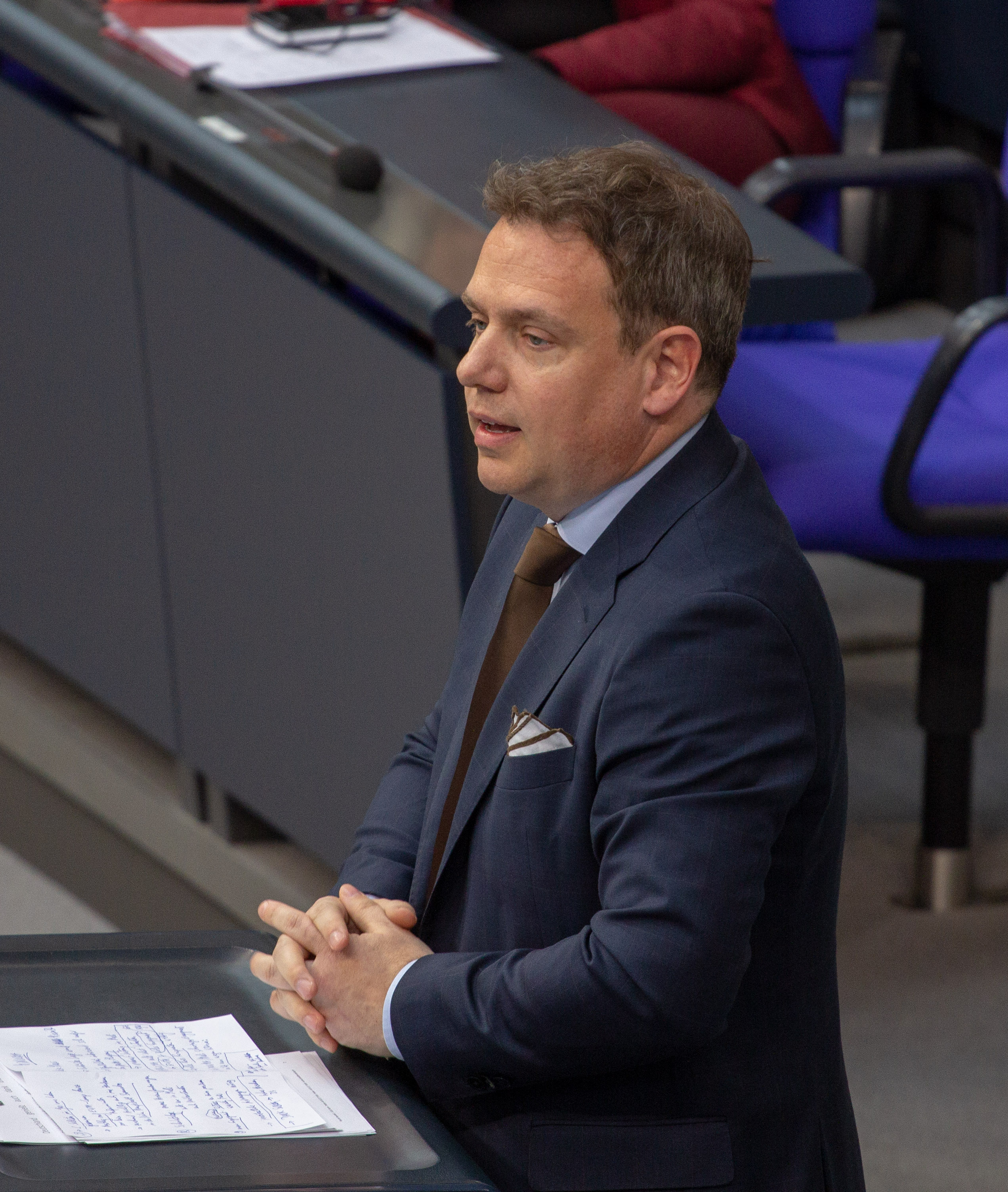 Markus Koob, Mitglied des Deutschen Bundestages, während einer Plenarsitzung am 11. April 2019 in Berlin.